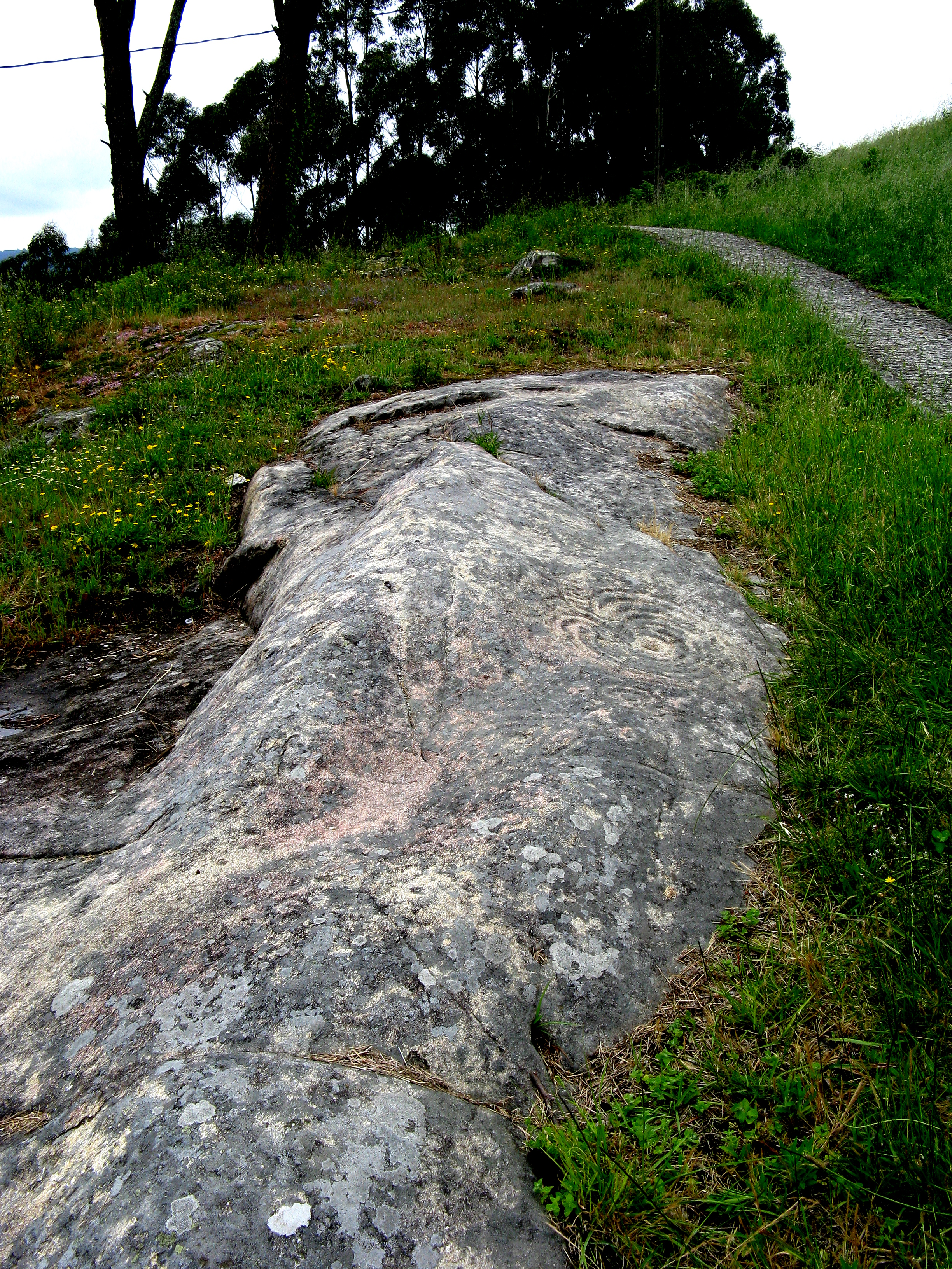 Situación do Laberinto de Mogor